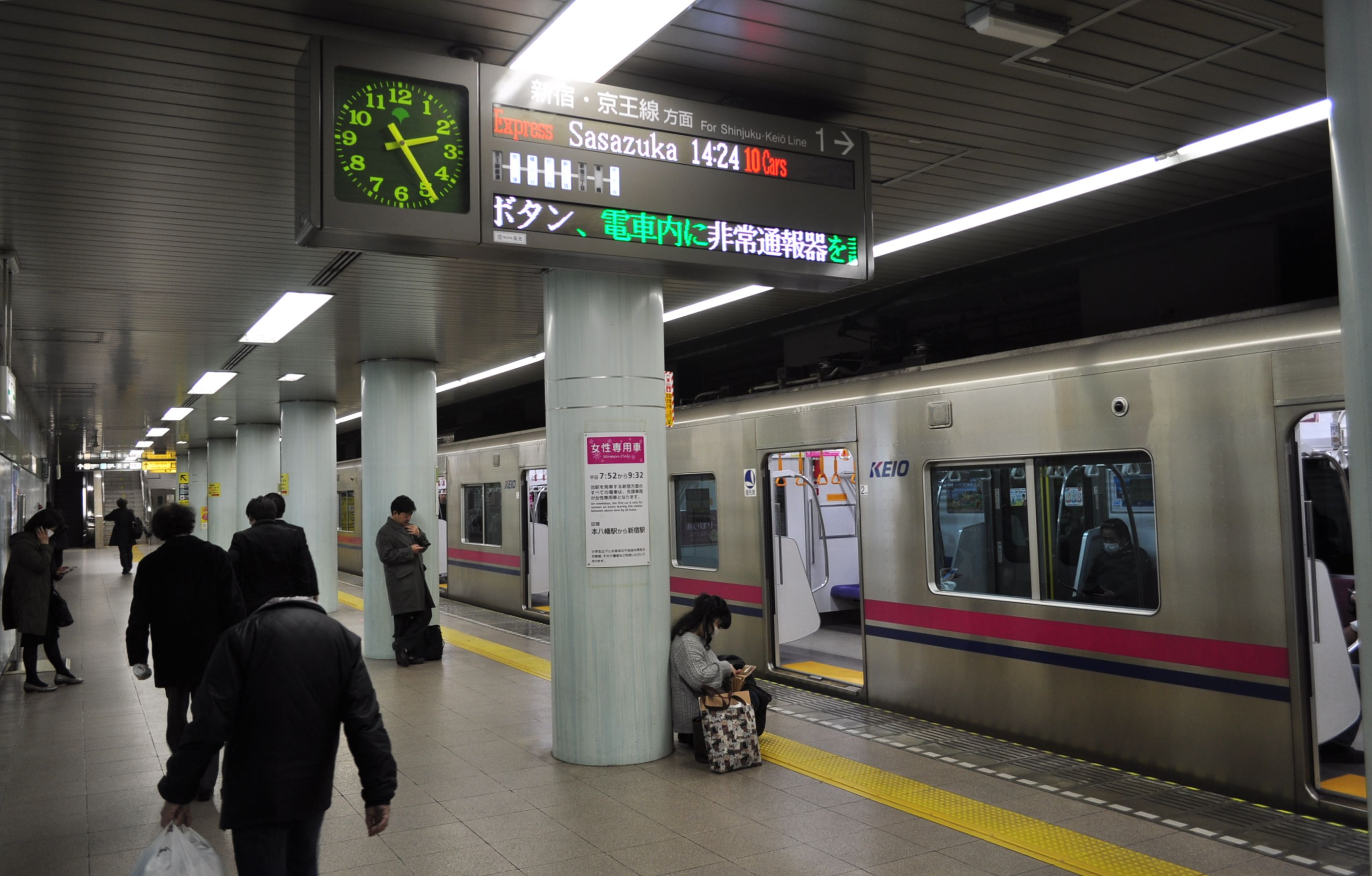 都営新宿線 市ヶ谷駅上り線ホーム